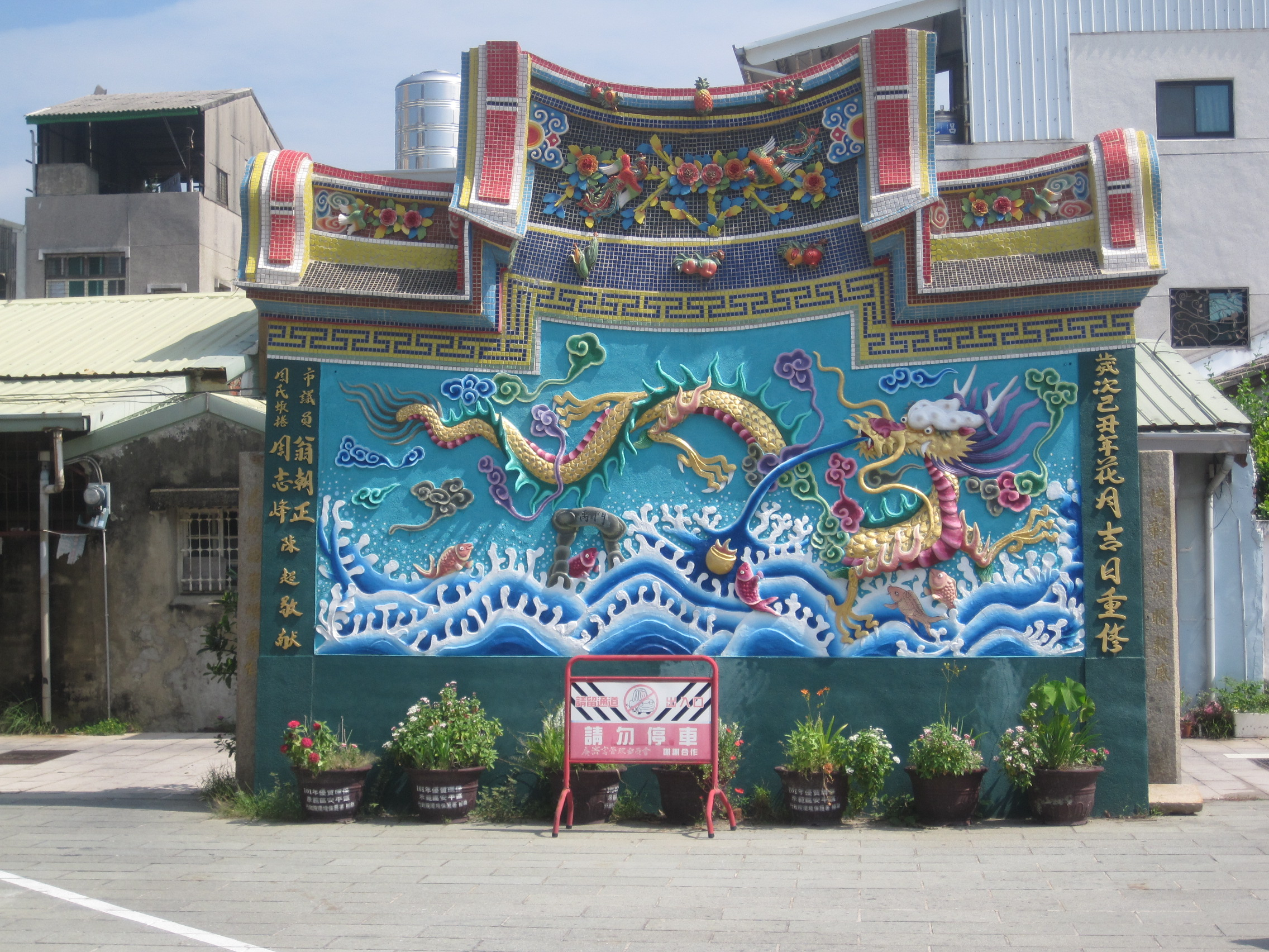 安平廣濟宮照牆